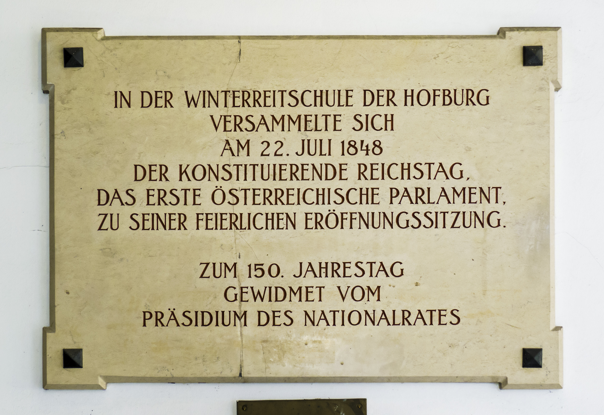 Gedenktafel in der Reitschulgasse in Wien 1